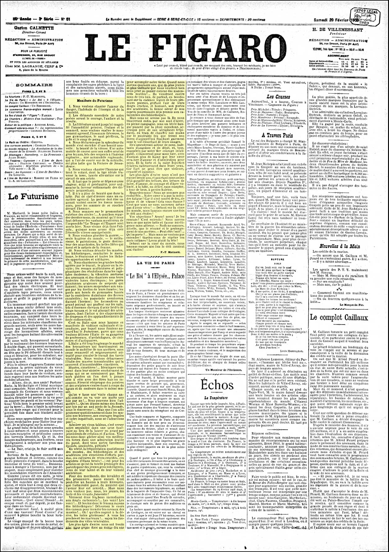 Prima pagina del quotidiano francese "Le Figaro" del 20 febbraio 1909 con la pubblicazione del "Manifesto del Futurismo" di Filippo Tommaso Marinetti